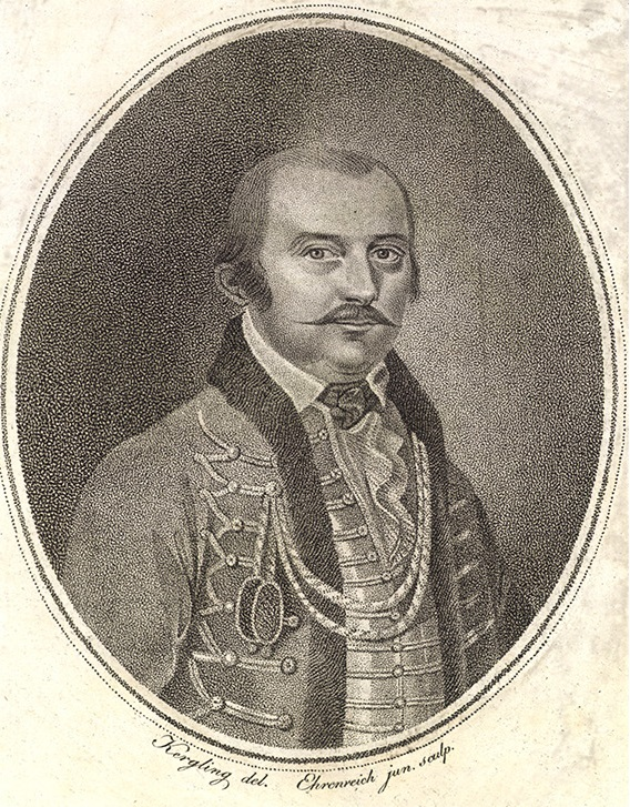 jáprai Spissich János zalai elsőalispán, szabadkőműves.